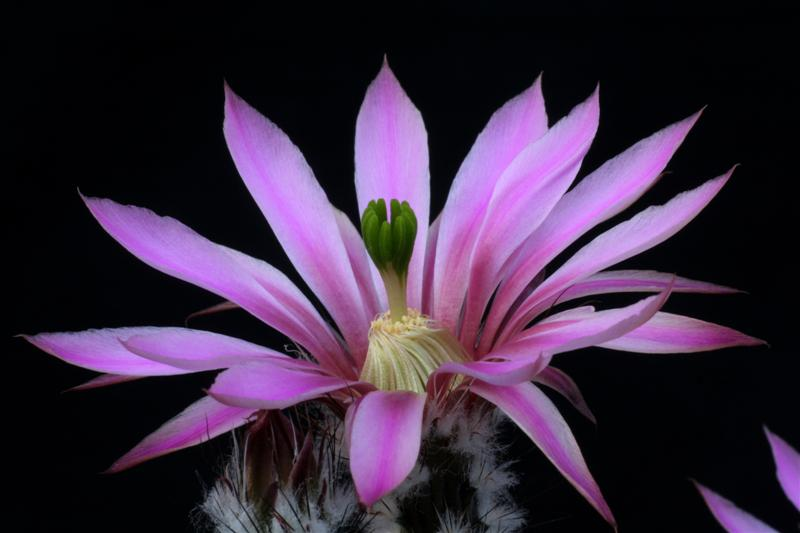 Echinocereus schmolii